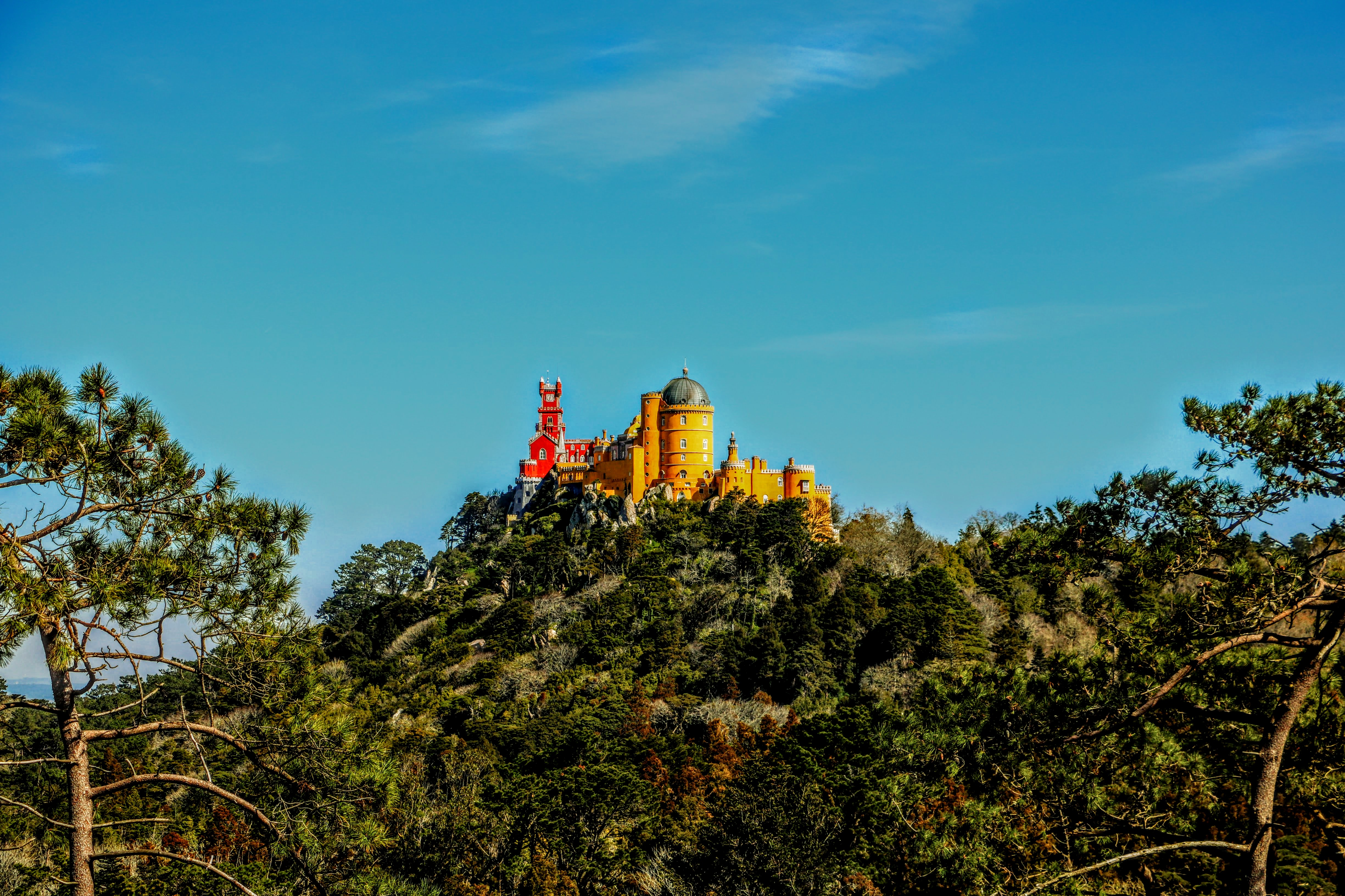 Parque Natural de Sintra-Cascais This is a photography of a protected area of Portugal indexed in the World Database on Protected Areas with the ID: 5809 (WDPA)